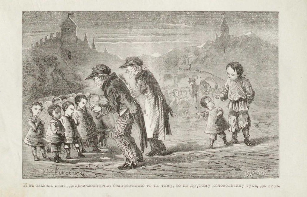 Иллюстрация к сказке "Городок в табакерке" В. Ф. Одоевского (издание 1871 года); рисовал В.Е. Маковский, гравировал на дереве Ю.Э. Конден